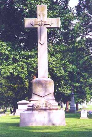 Grabmal des Henry von Phul (1784-1874) und der Rosalie von Phul (1797-1887), Calvary Cemetery and Mausoleum, Saint Louis, St. Louis City, Missouri, USA